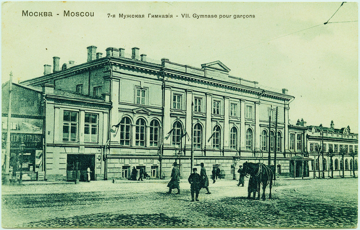 7-я Московская гимназия располагалась в не существующем ныне здании на бывшей Страстной (Пушкинской) площади, на месте комплекса "Известий".